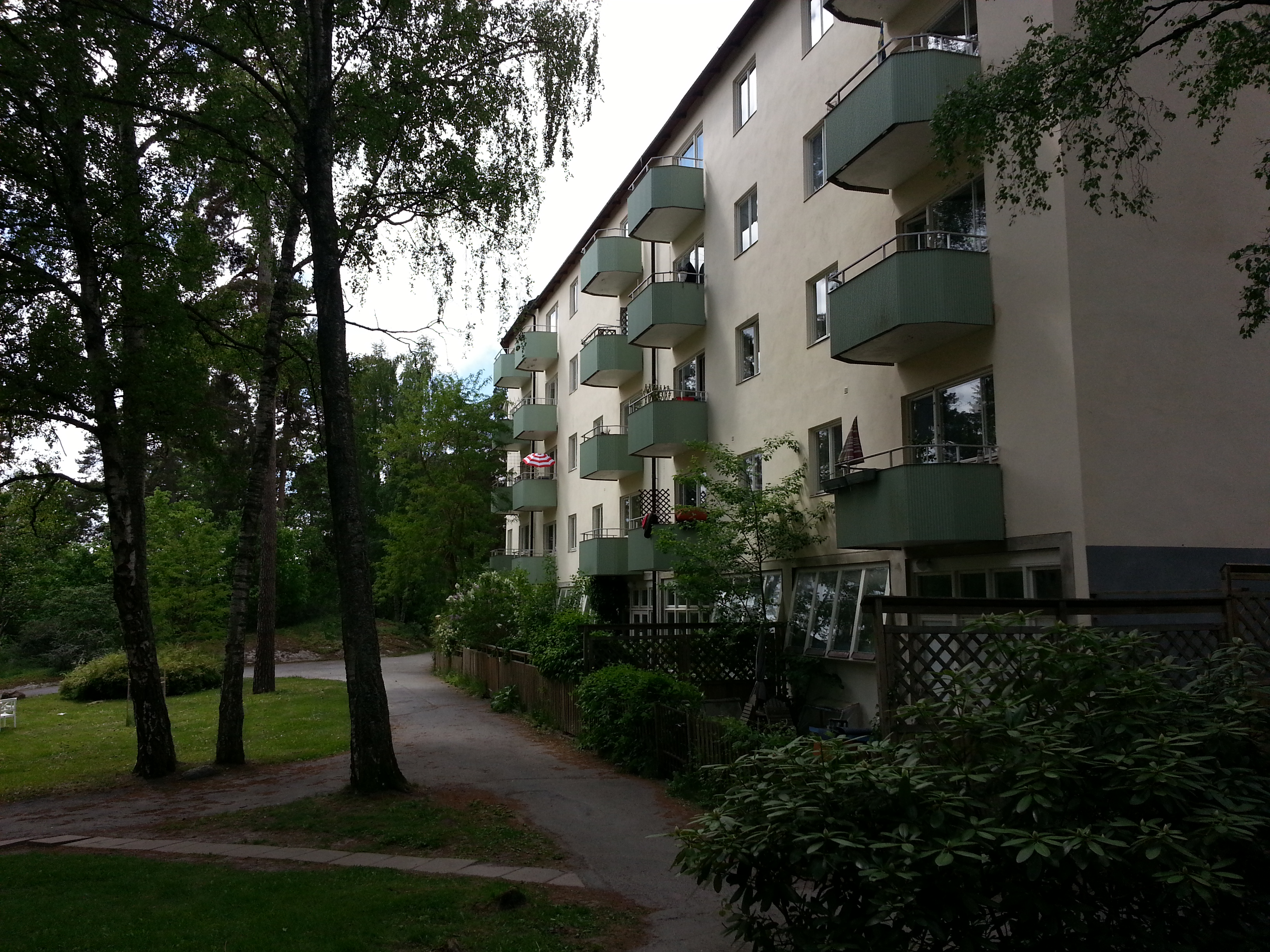 med ateljéer i bottenplanet